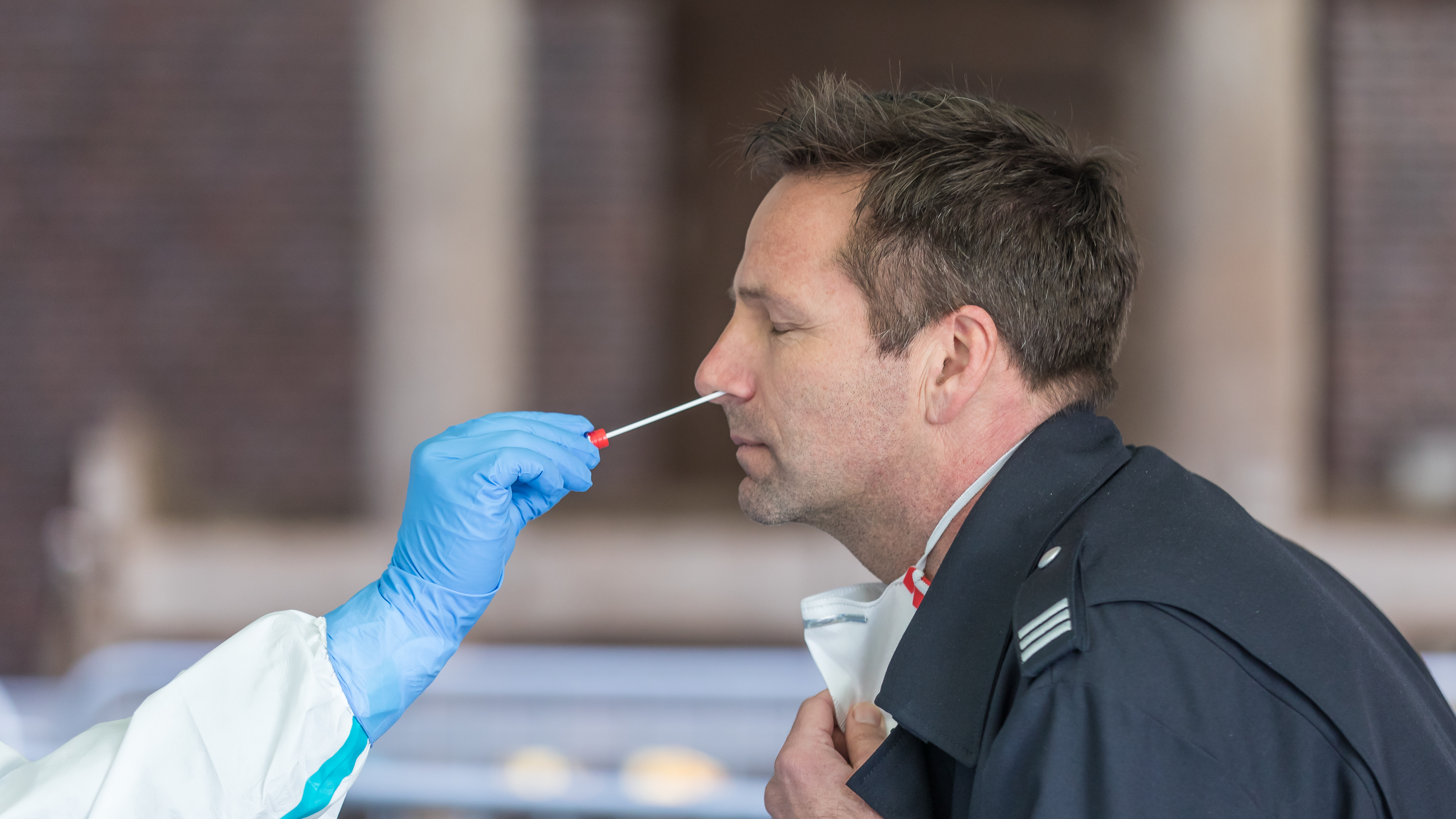 Infektionsschutzzentrum im Kulturquartier/Rautenstrauch-Joest-Museum, Köln. Getestet werden dort ausschließlich Personen, die in sogenannten kritischen Infrastrukturen tätig sind.Mitarbeiter des Infektionsschutzzentrums demonstrieren an einem Feuerwehrmann, der sich als Testperson zur Verfügung stellt, wie ein Abstrich durchgeführt wird.